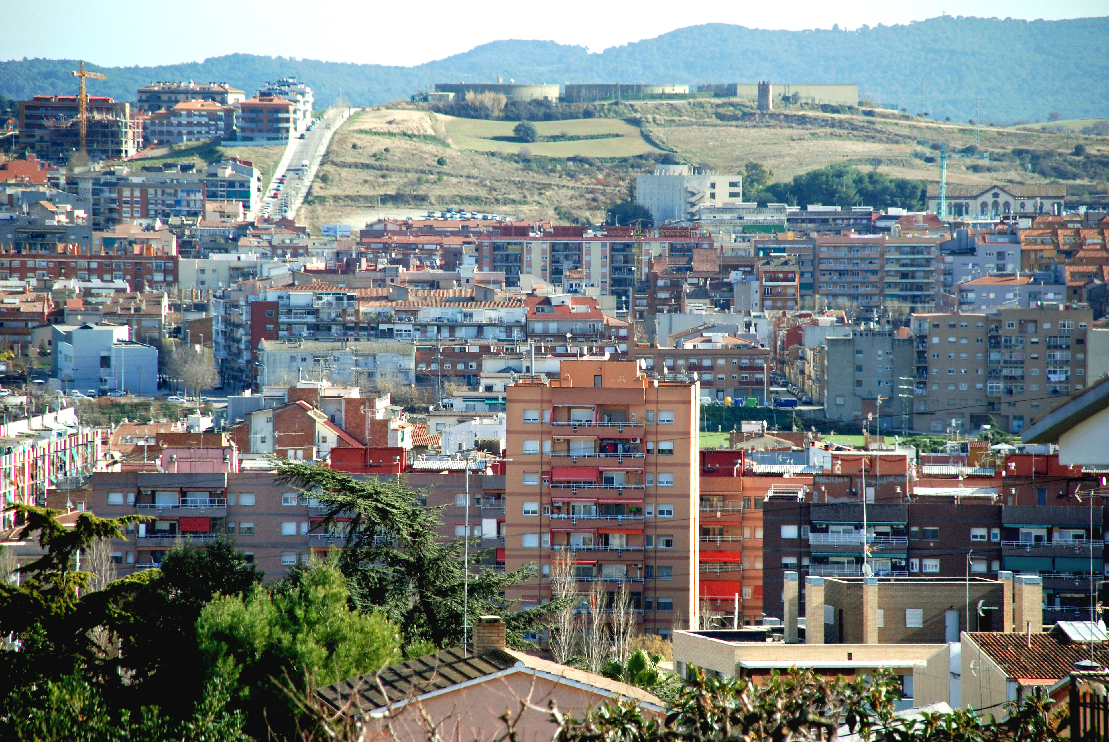 Canovelles sights. - Vistas de Canovelles - Vistes de Canovelles